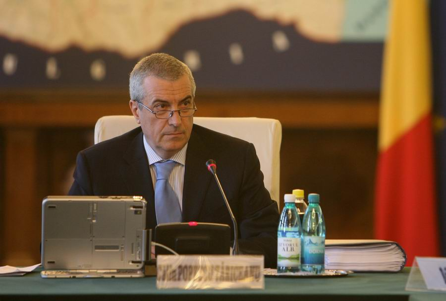 Călin Popescu-Tăriceanu at a government meeting